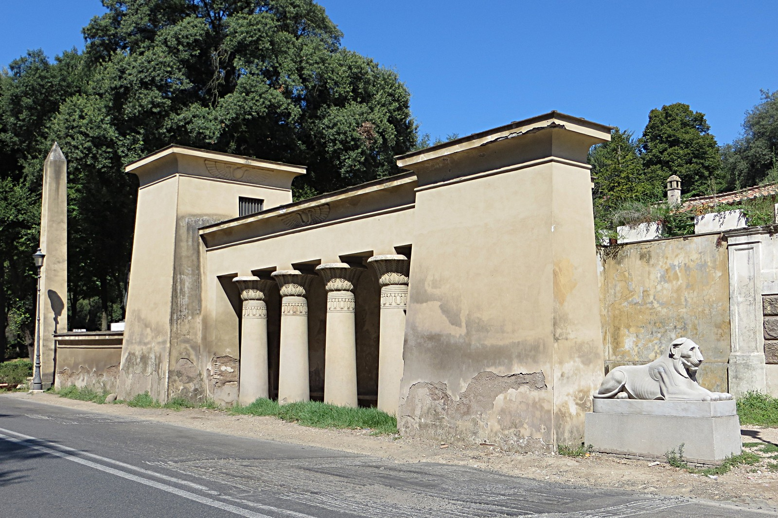 Villa Borghese - Viale Fiorello la Guardia